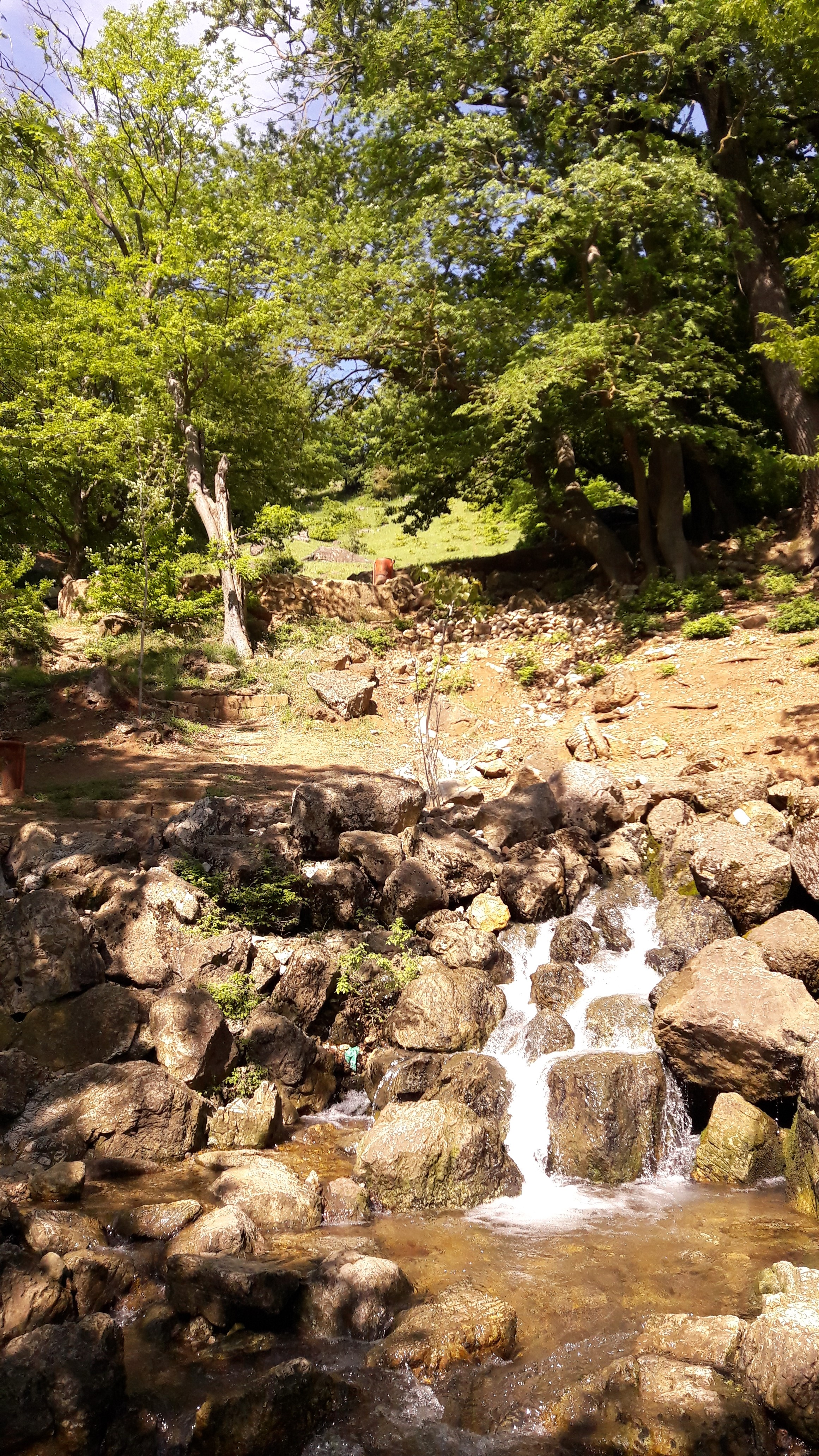 چشمه بار. عکس از سعید صادق پور